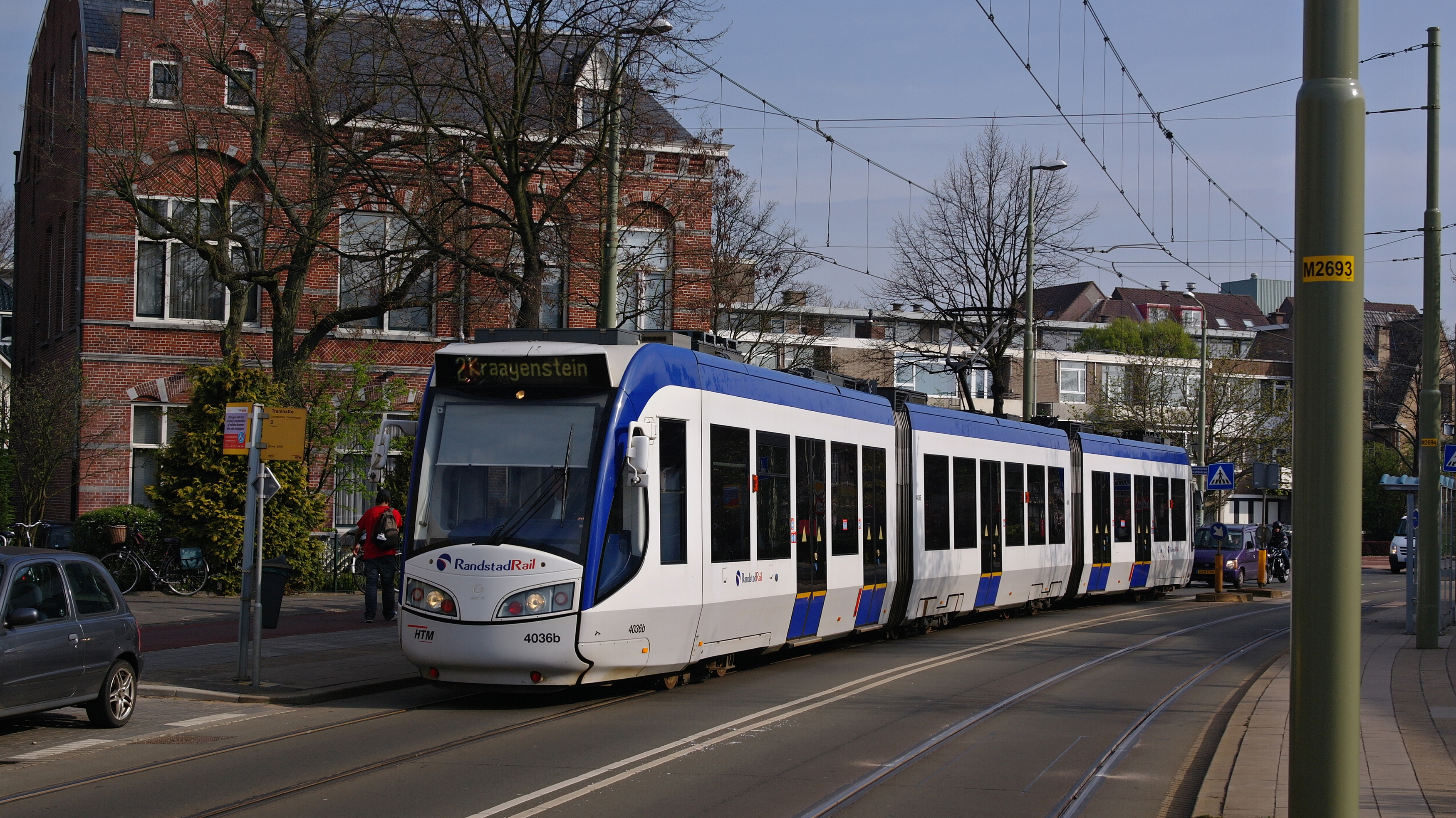 Regio Citadis 4036 op lijn 2, Loosduinen, Den Haag. Op de achtergrond het vroegere hoofdkantoor van de WSM.